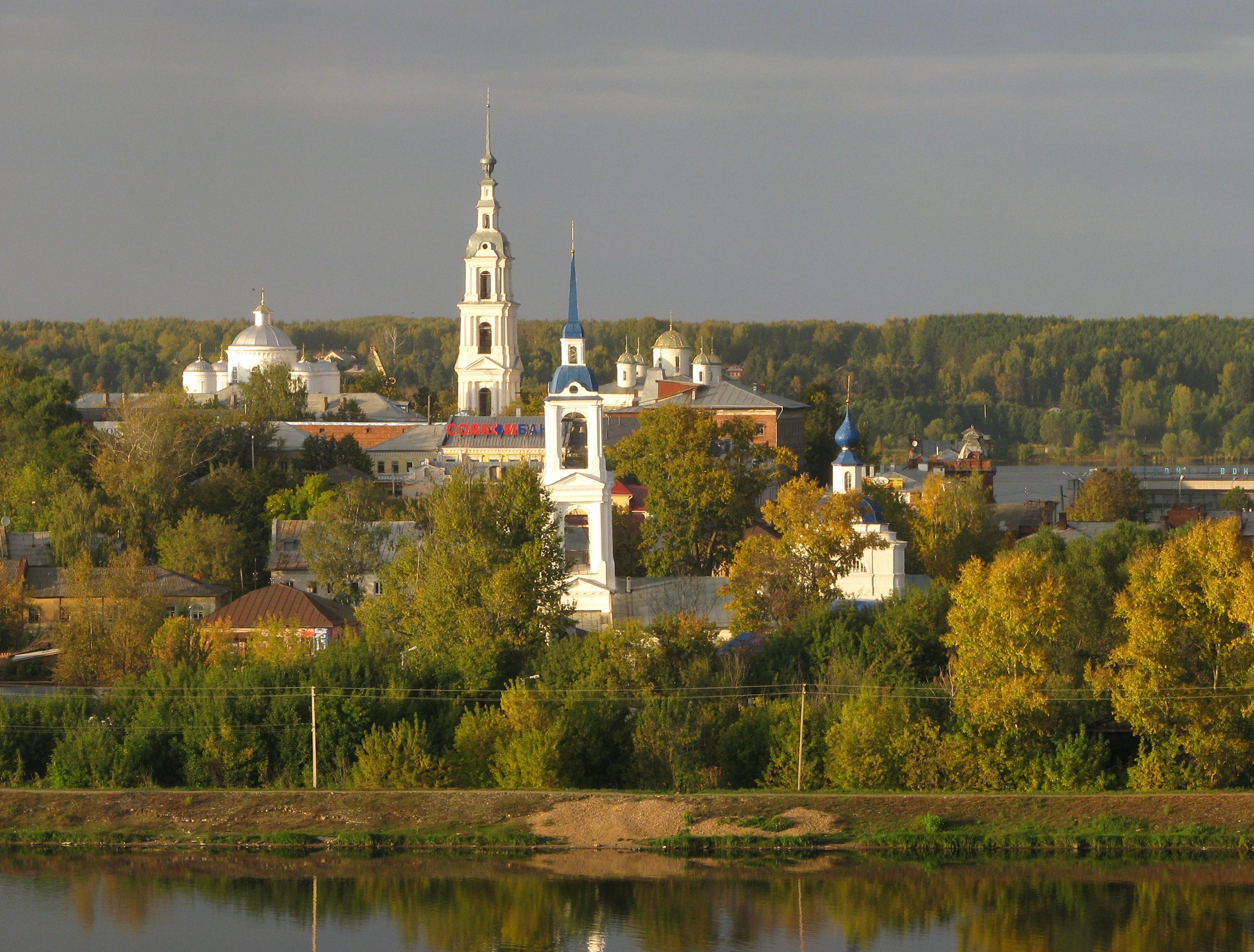 Исторический центр Кинешмы